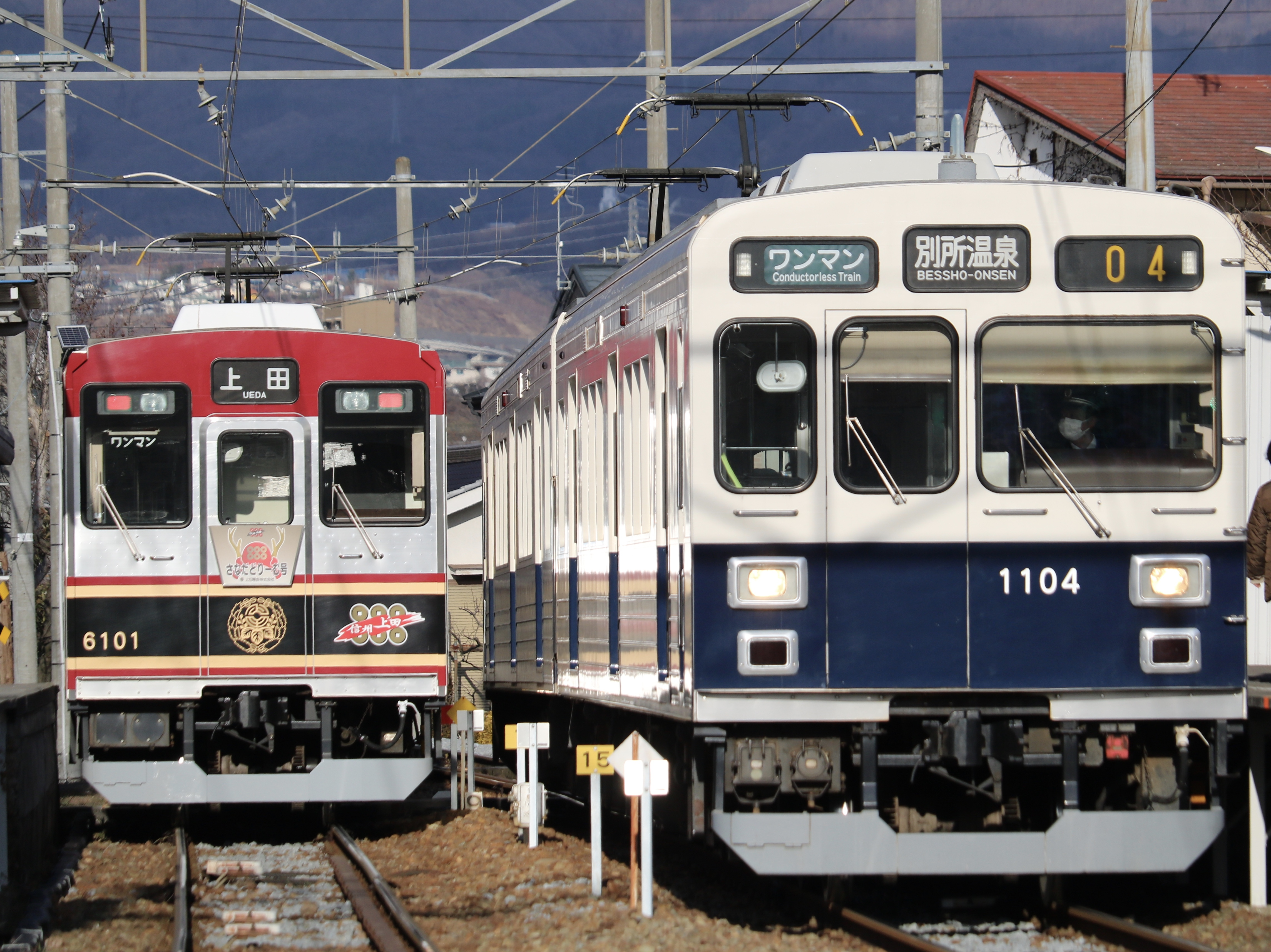 城下駅にて